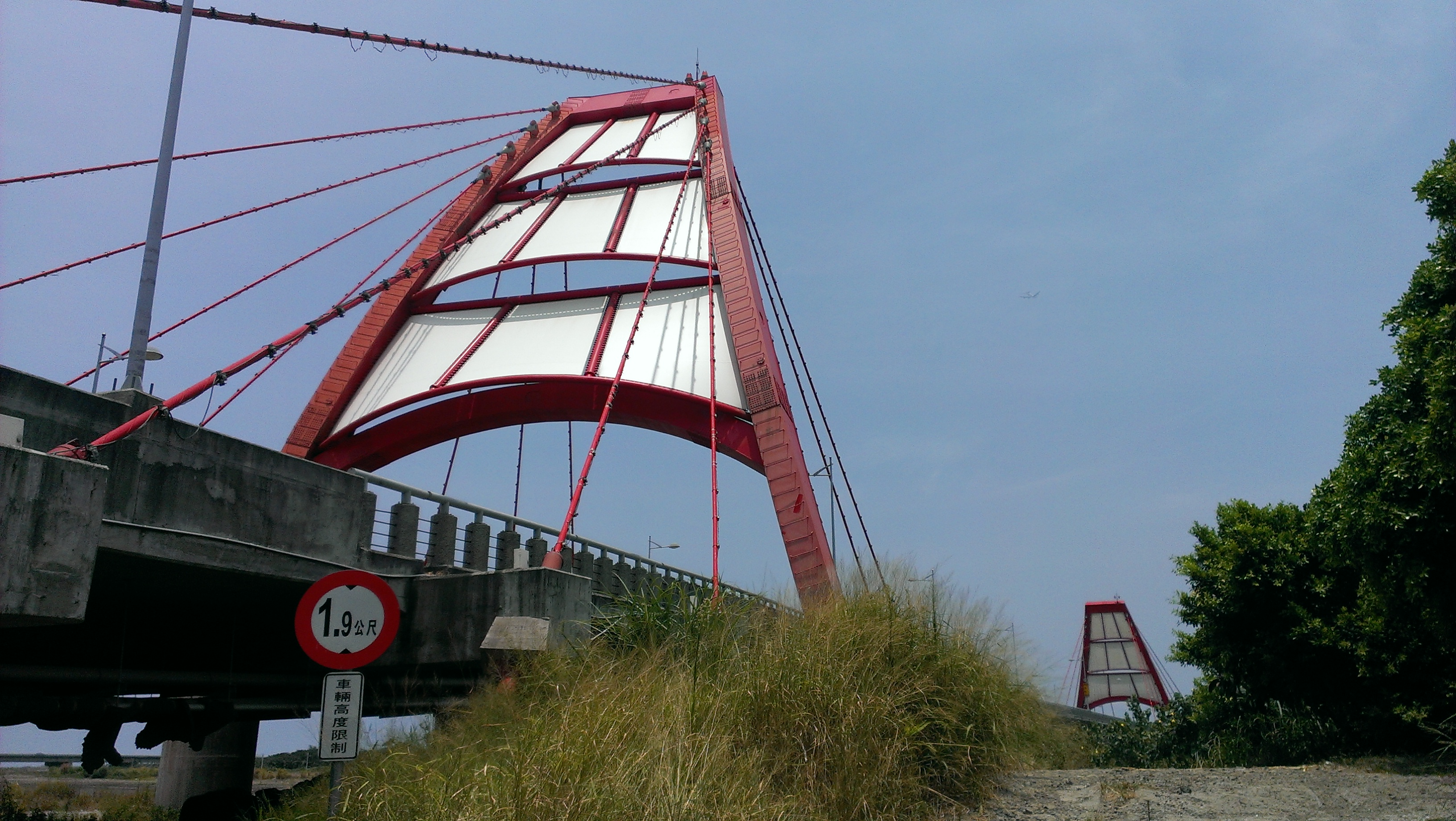 中文（台灣）: 位處頭前溪之舊港大橋